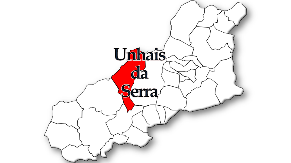 População